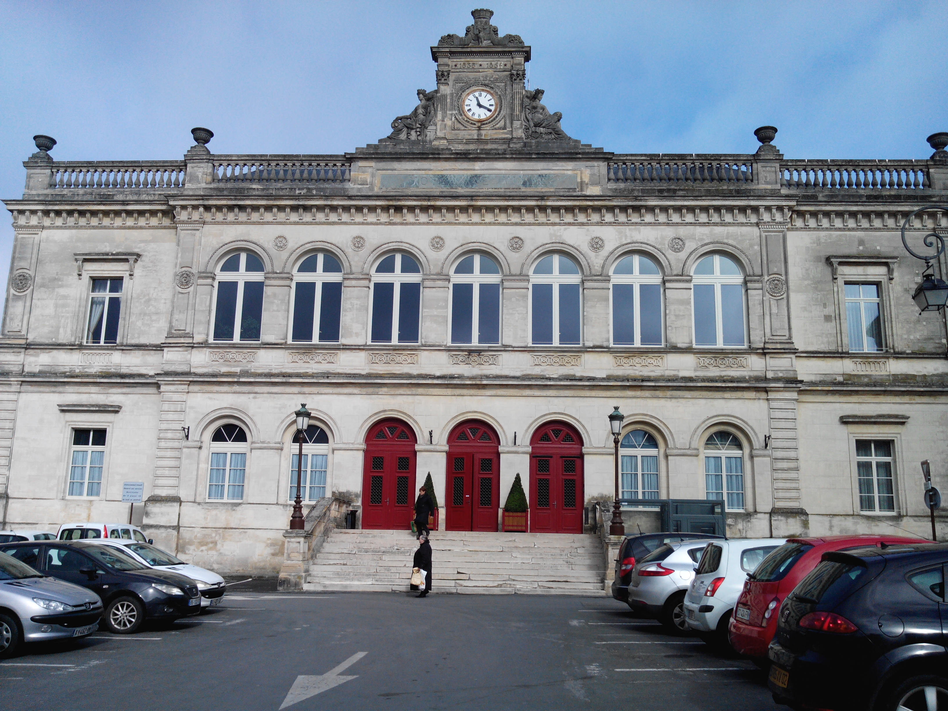 Hôtel de ville